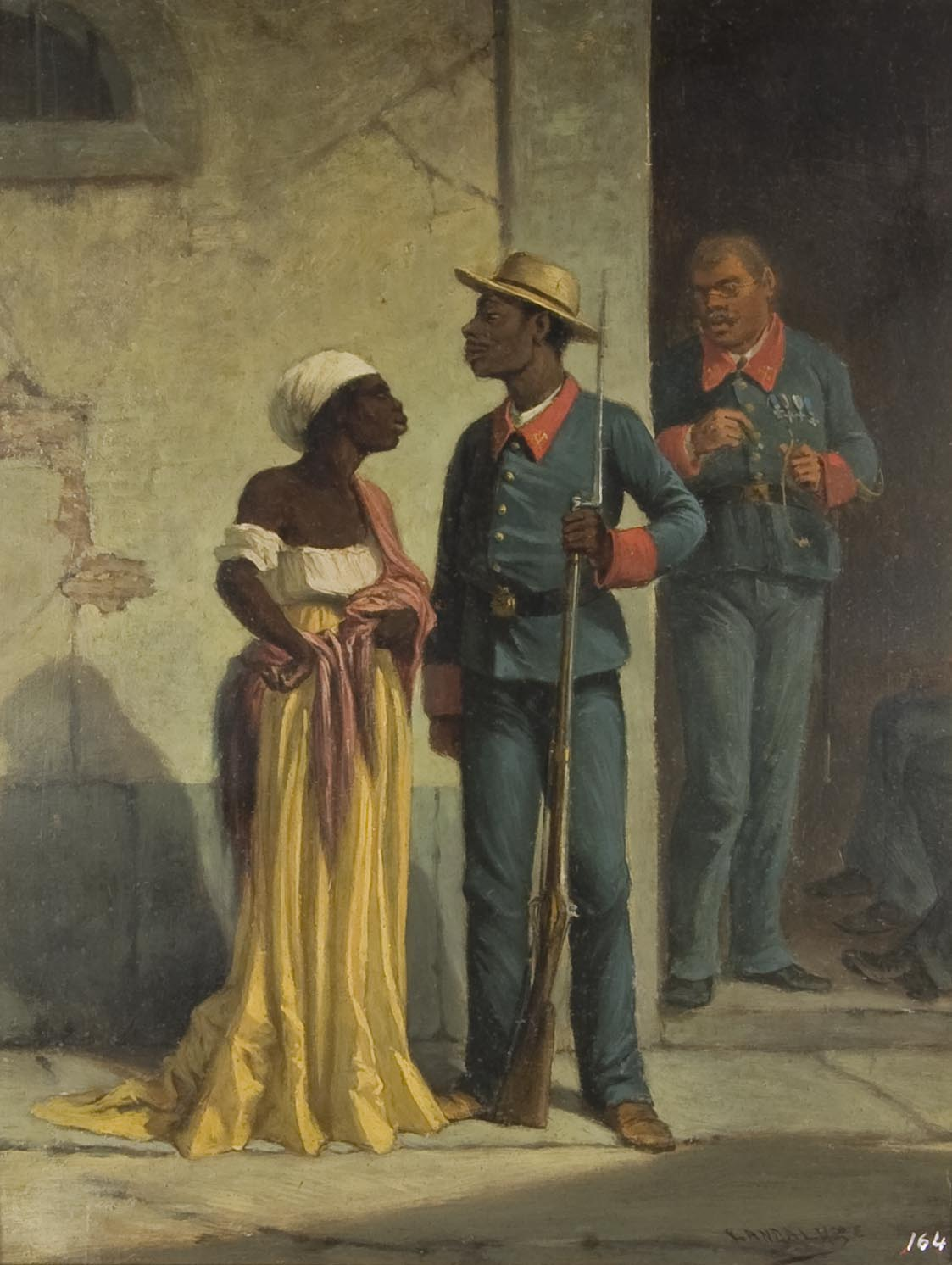 Representació d'una escena de carrer en la qual un soldat negre amb uniforme i fusell dotat de baioneta parla amb una dona també negra, mentre un altre militar negre condecorat -amagat darrera la cantonada i en segon terme-, els observa